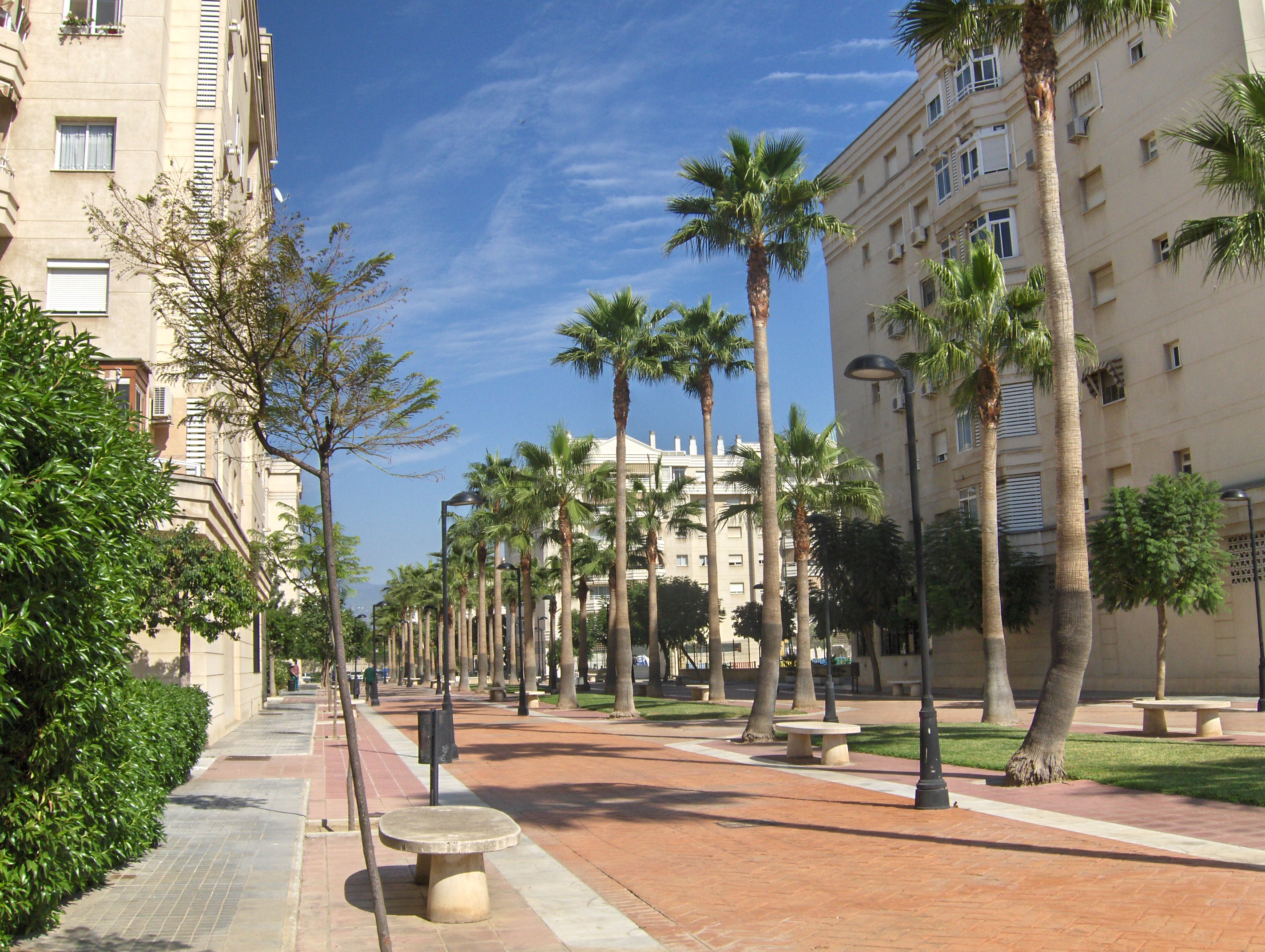 Calle de Francisco de Salinas, barrio de San Carlos, Málaga, España.